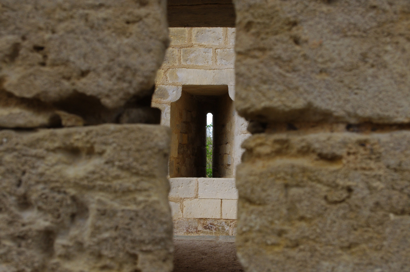 Meurtrières du château fort de Gençay (Vienne, France)